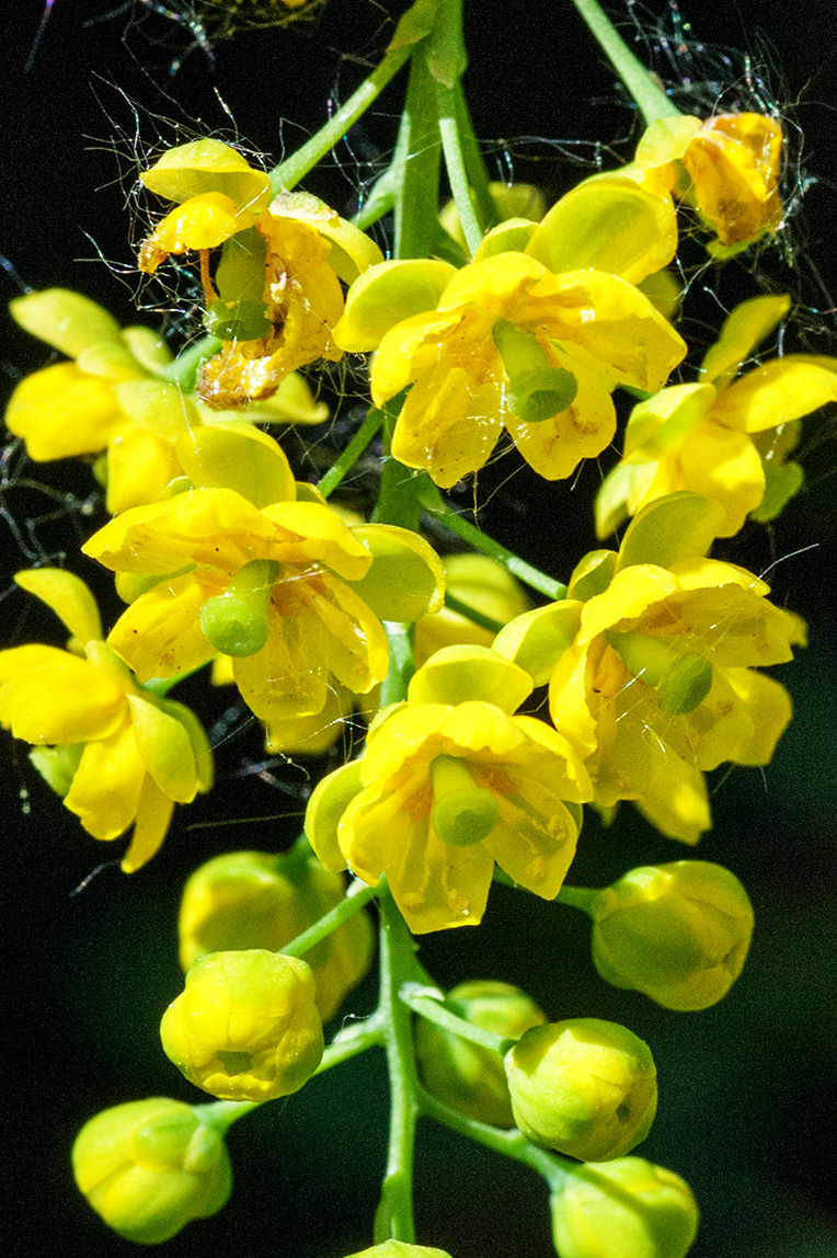 цветы барбариса